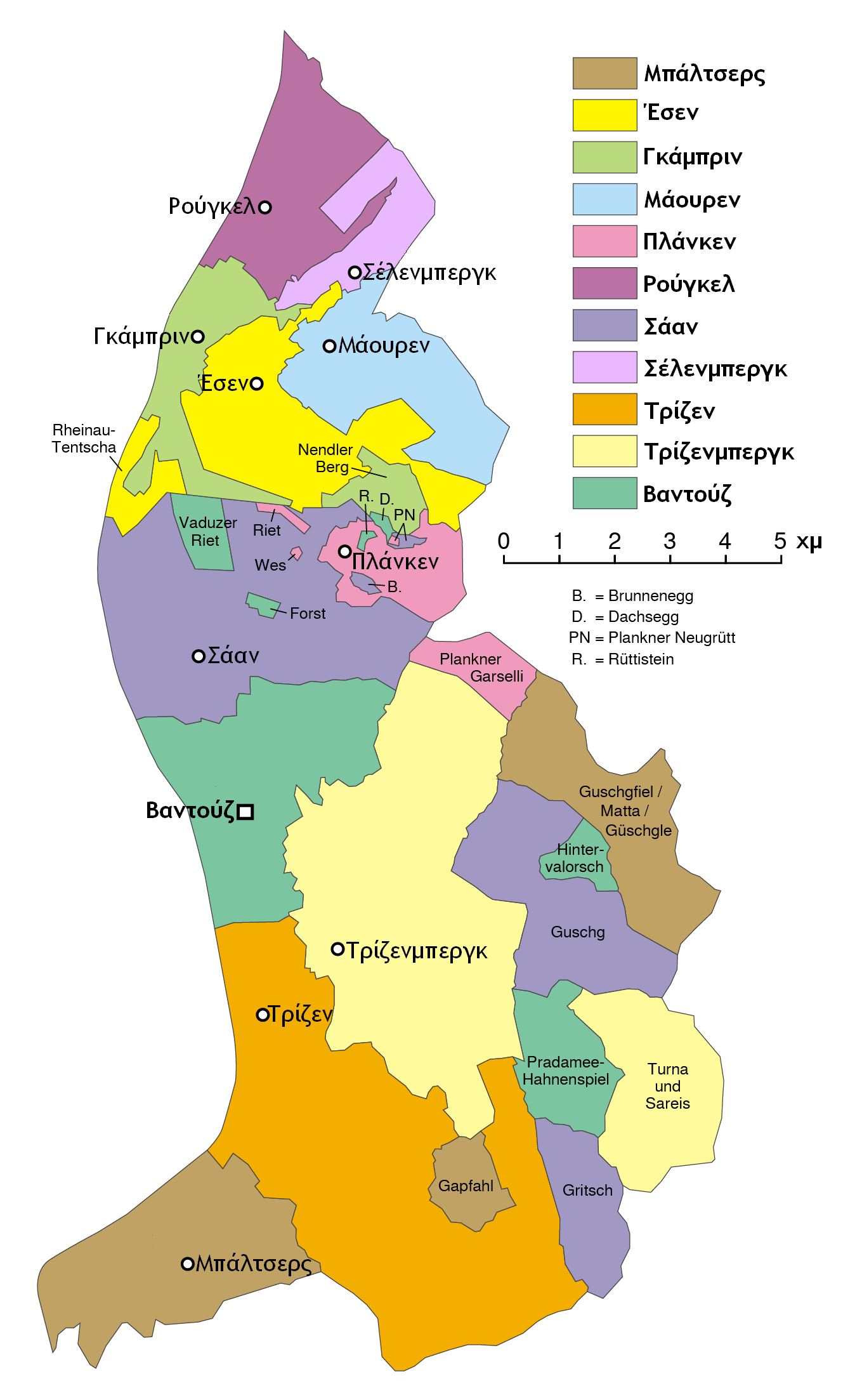 Δήμοι του Λίνχτενσταϊν με τα περίκλειστα και αποσπασμένα εδάφη